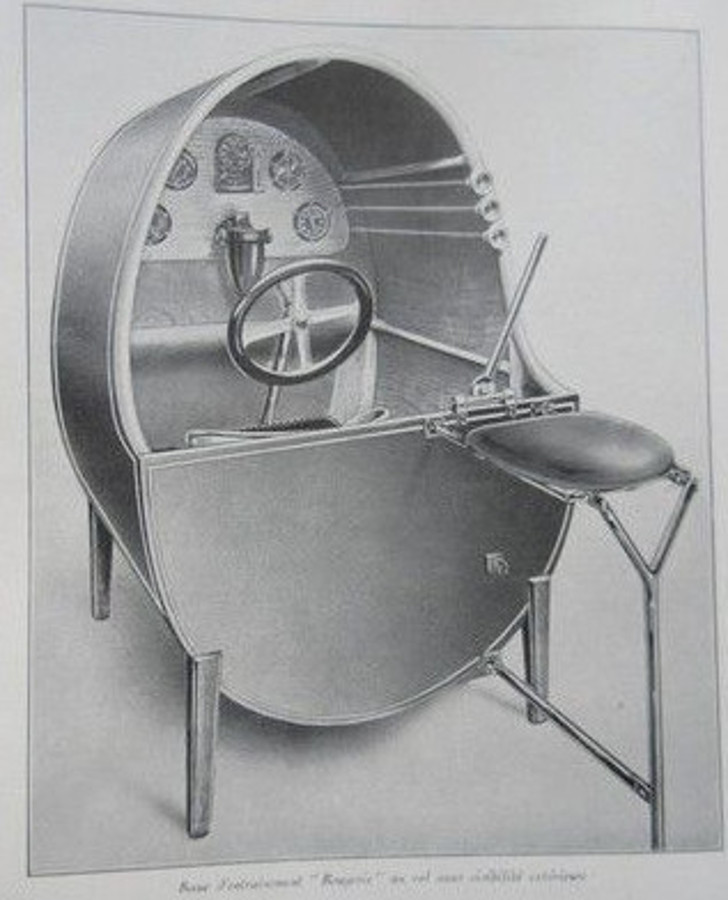 Banc d'entraînement au sol mis au point par Rougerie.